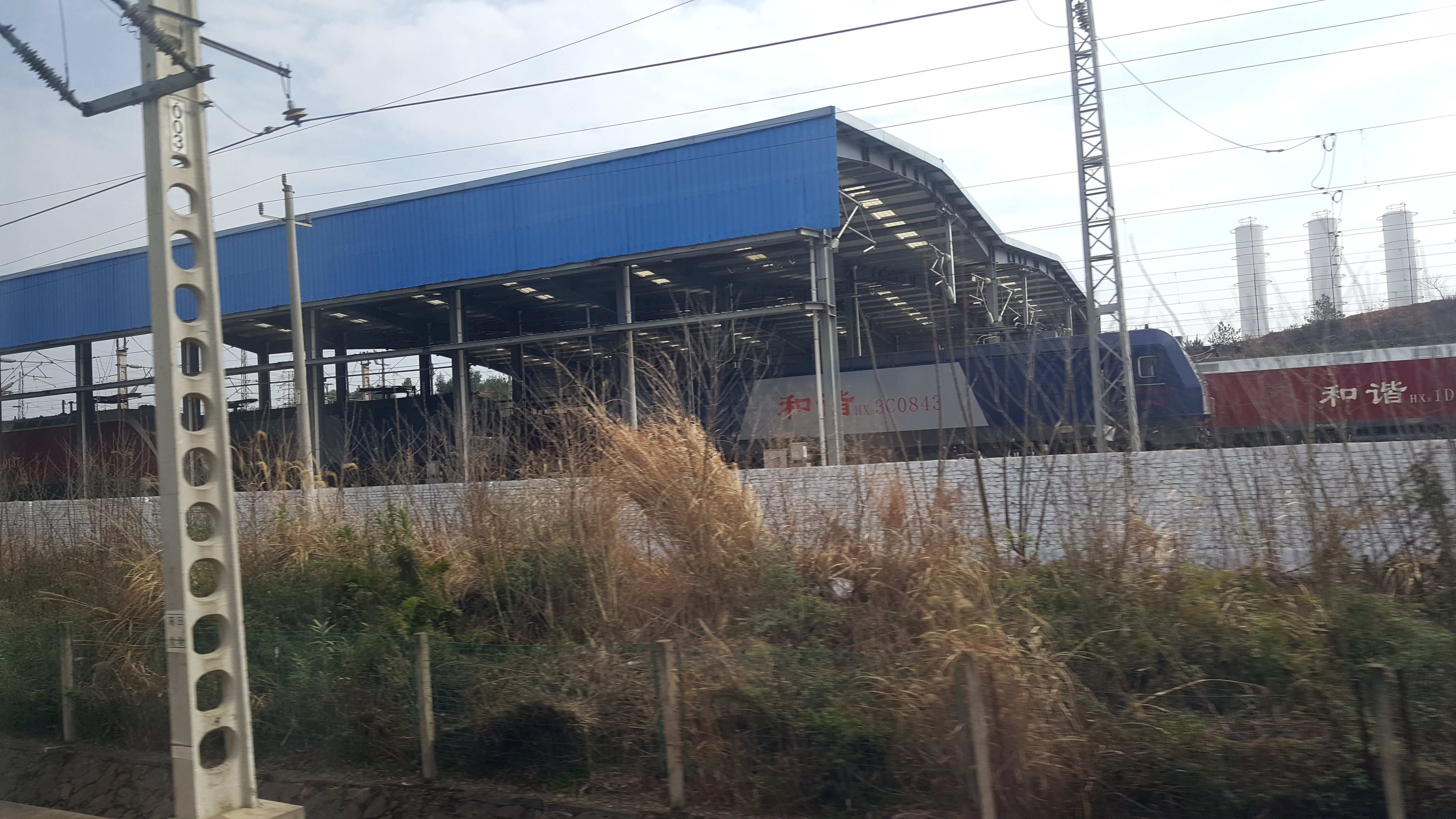 中文（中国大陆）: 赣州机务折返点